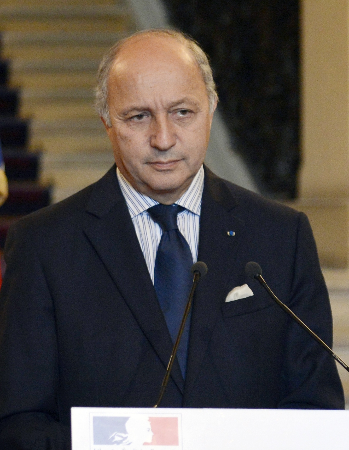 Laurent Fabius 4 février 2013